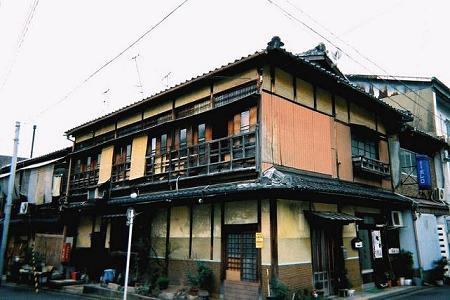 旧五番町遊廓、旧妓楼 （京都市上京区、2000年・利用者:今紫による撮影）